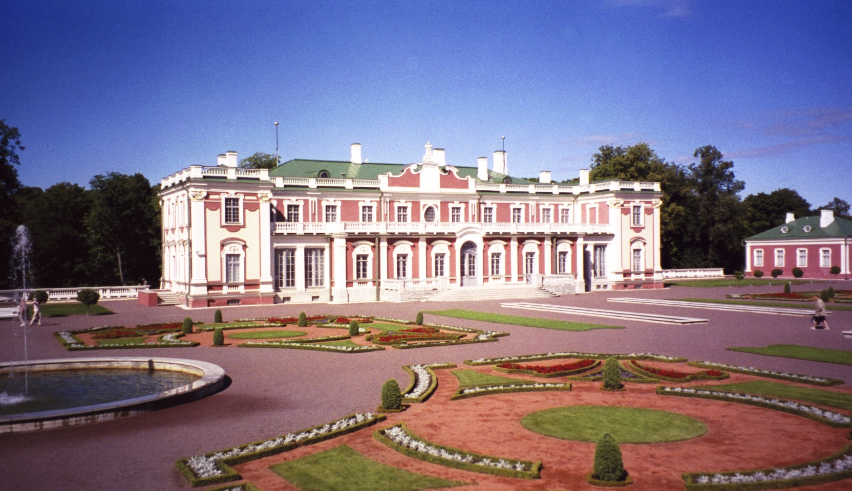 Kadriorg Palace, TallinnFolks_at_137